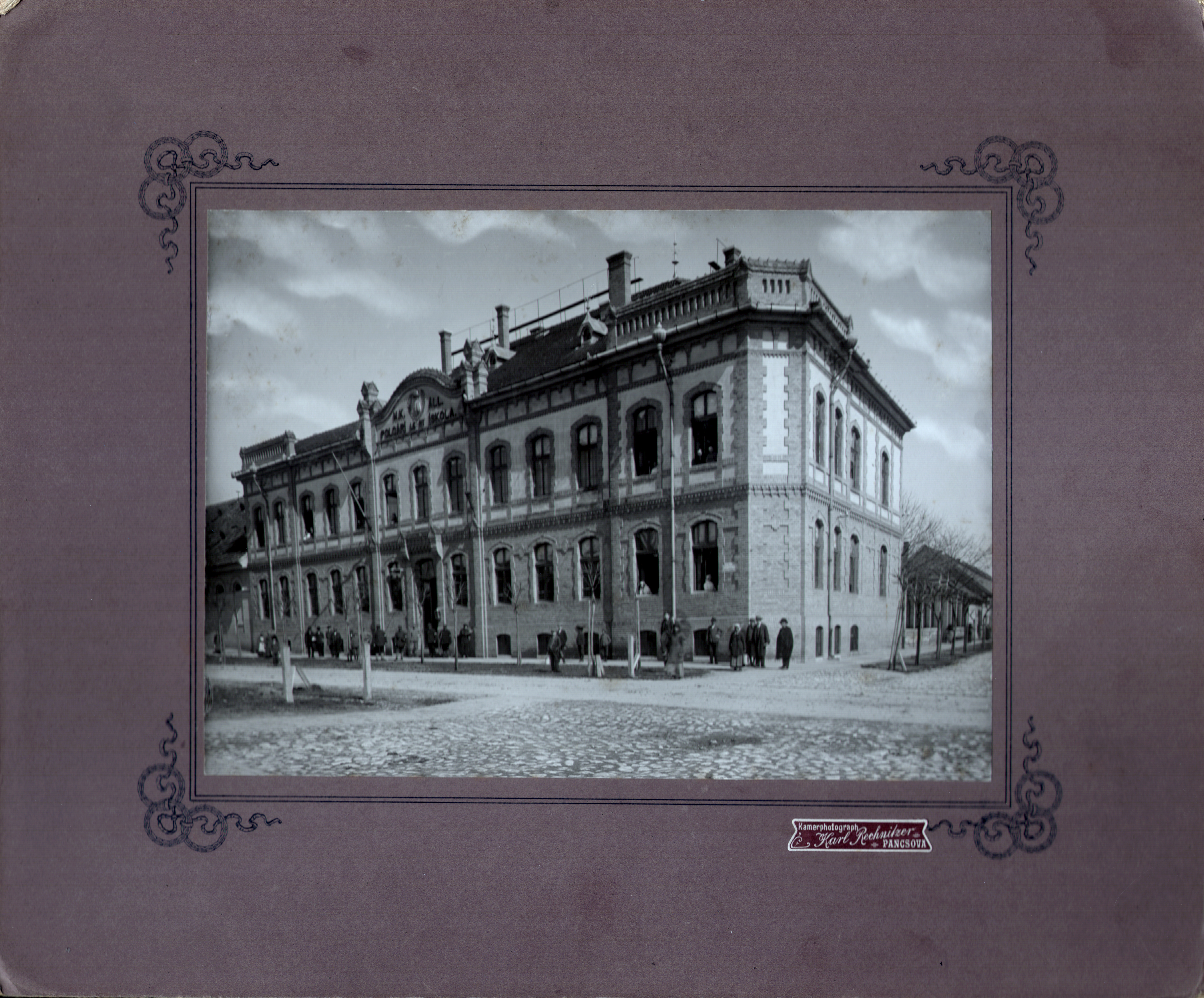 Srpski (latinica): Slika Mađarske kraljevske državne ženske građanske škole.